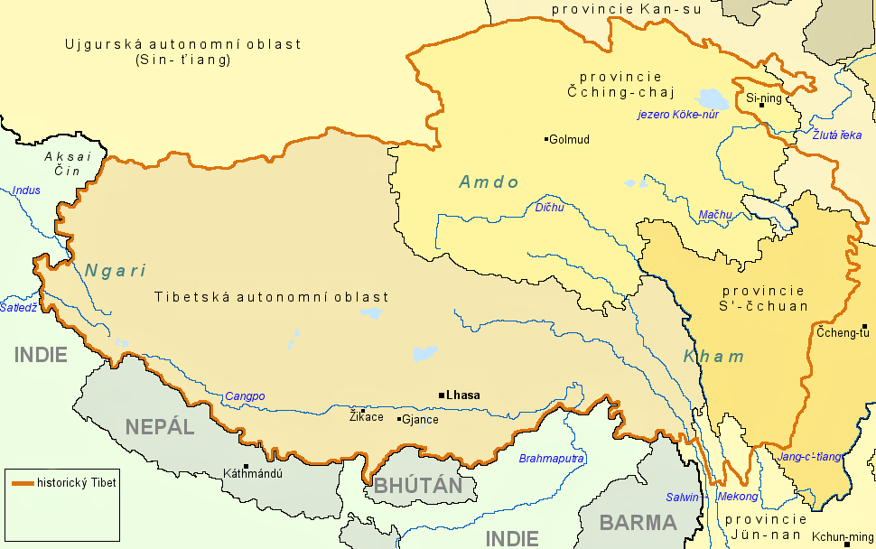 Mapa historického Tibetu.